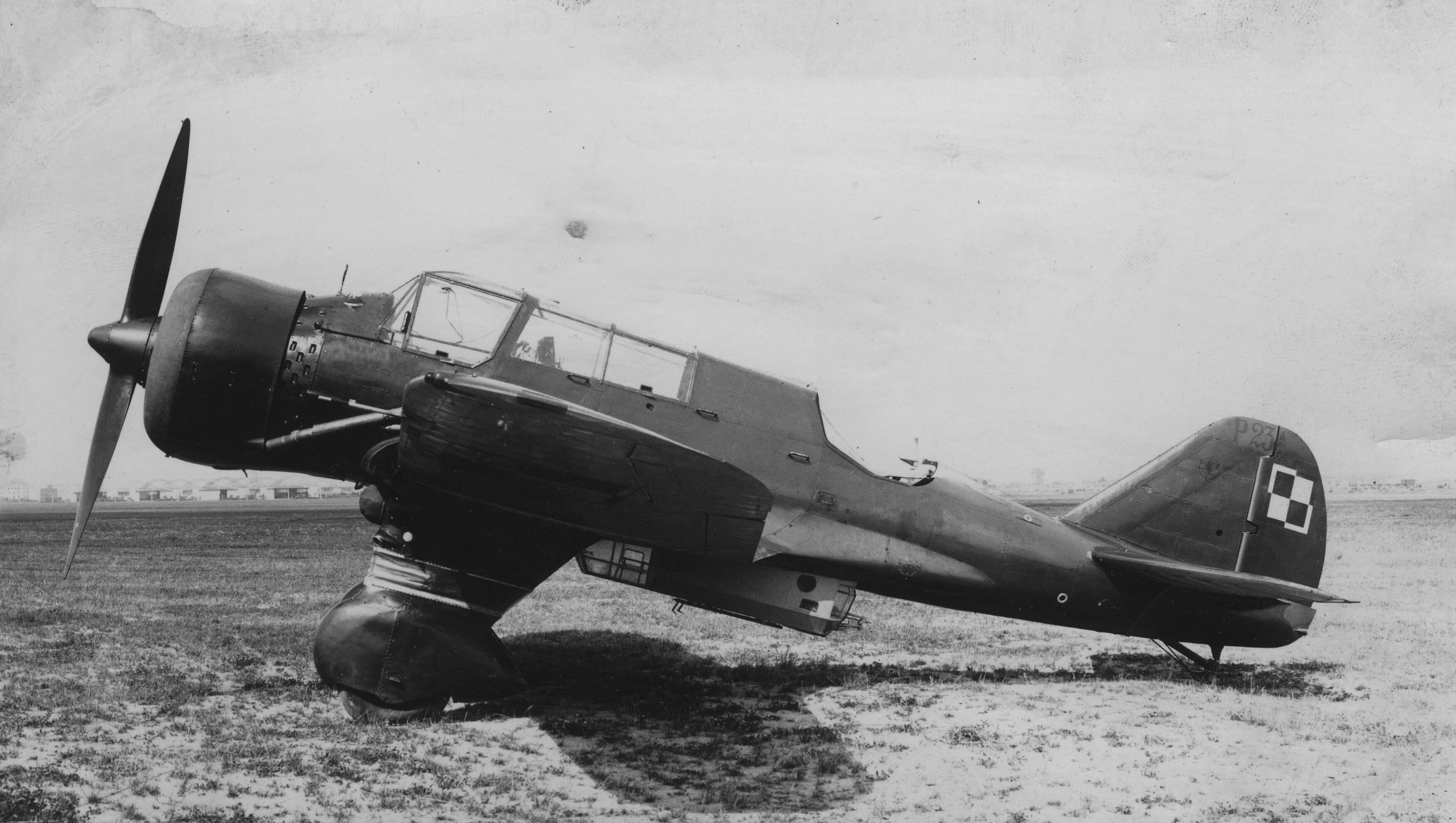 Samolot PZL-23 "Karaś" na lotnisku. Koncern Ilustrowany Kurier Codzienny - Archiwum Ilustracji. Sygnatura: 1-W-1554